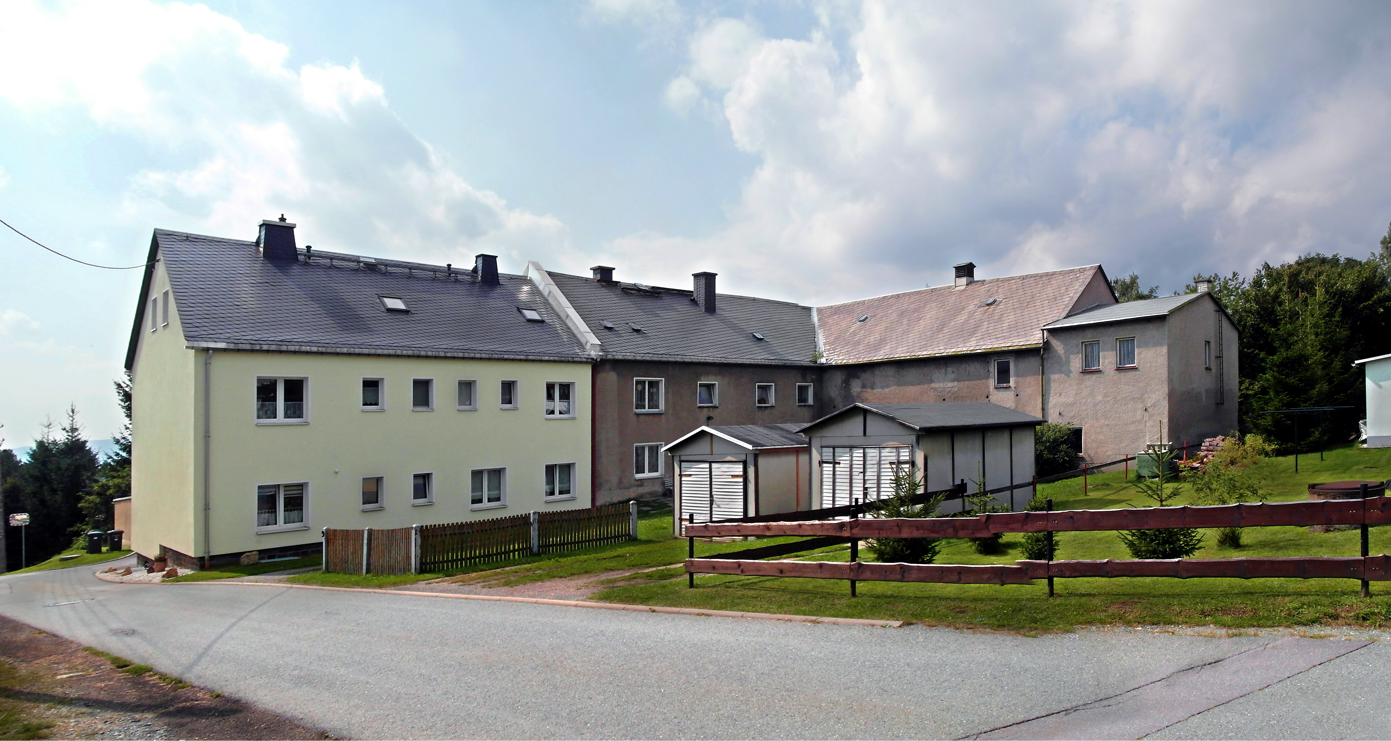 27.08.2017 09496 Hilmersdorf (Wolkenstein), Straße des Friedens 9-12. Rittergut Hilmersdorf (GMP: 50.674427,13.11682). Sicht von Osten in den ehem. Gutshof zu den Gebäuden Straße des Friedens 9, 11 (GMP: 50.674294,13.116651). Heute Wohnhaus. [SAM1995+1598.JPG]20170817250MDR.JPG(c)Blobelt